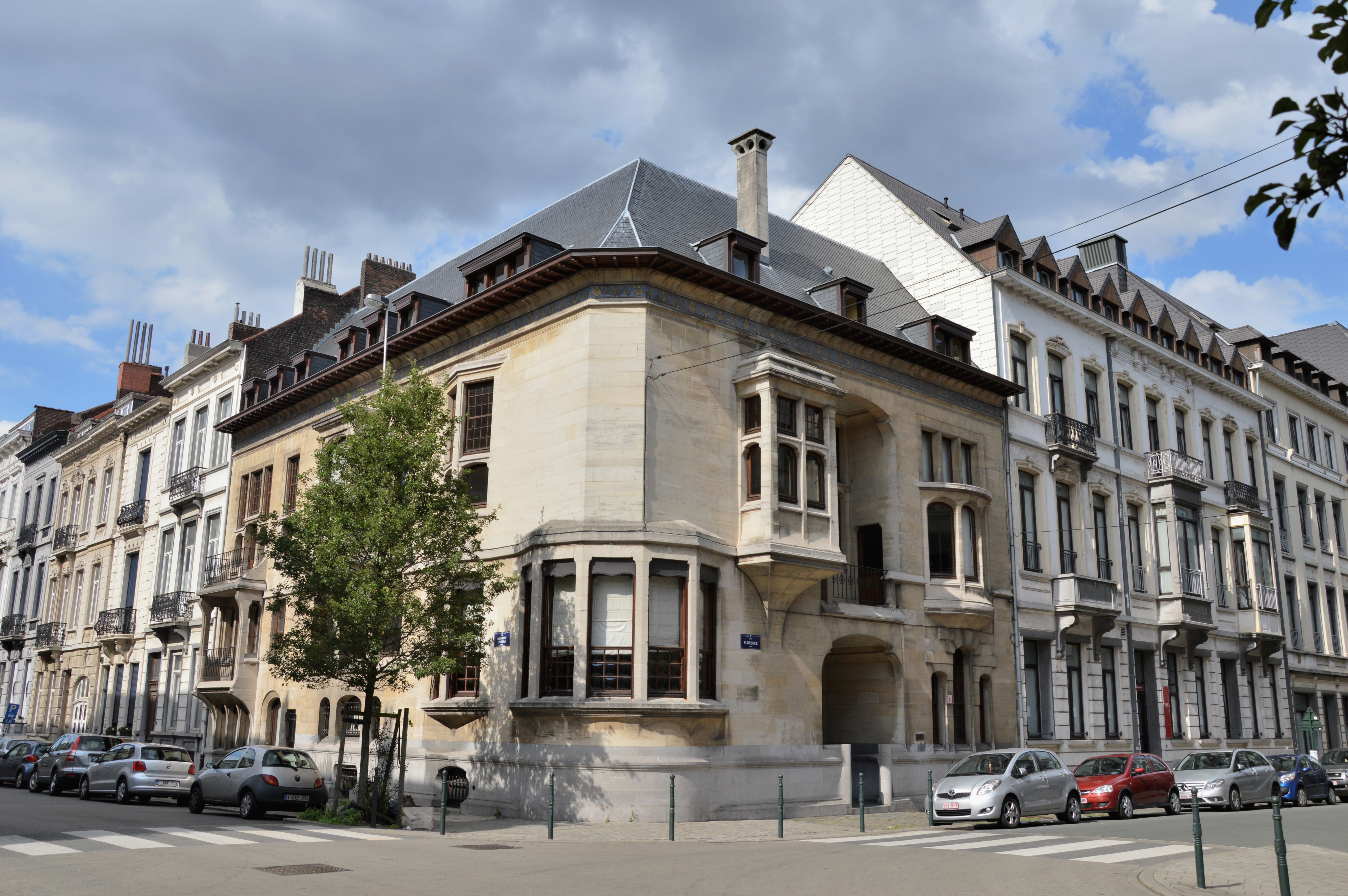 Bruxelles, angle - rue de Livourne et rue de Florence.